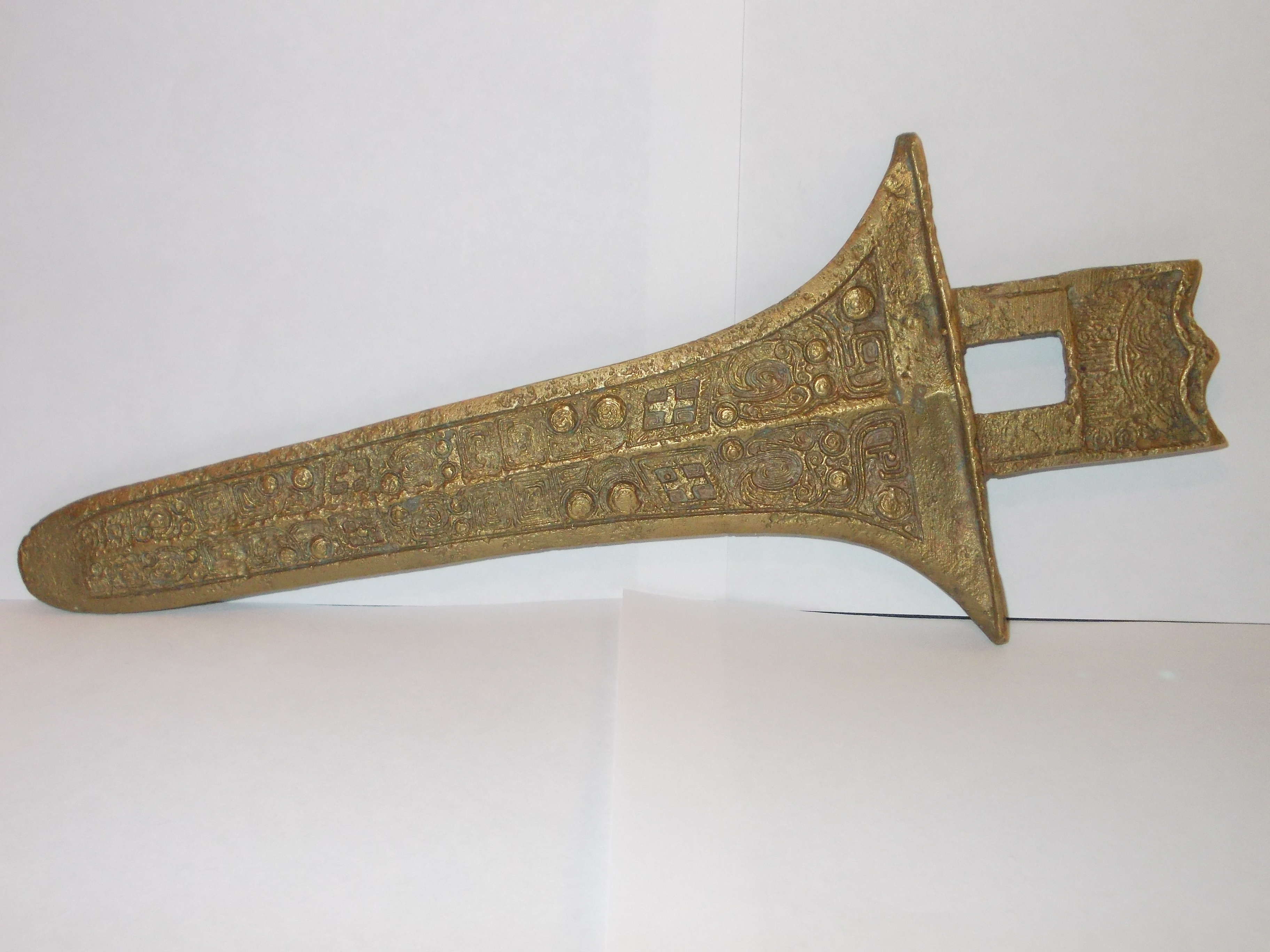 lunghezza lama 20 cm., lunghezza totale 25 cm., larghezza 10,5 cm.